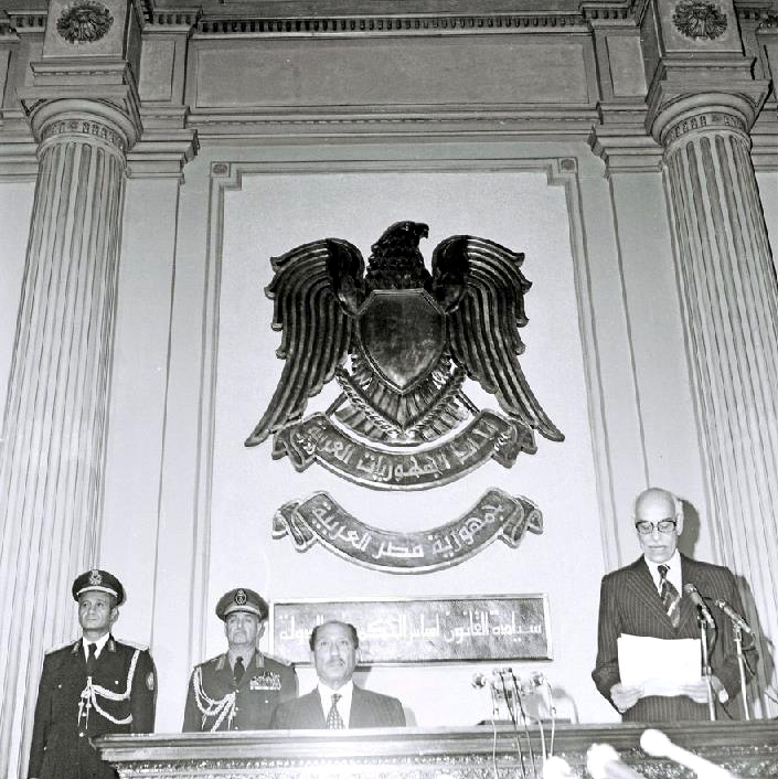 الرئيس المصري محمد أنور السادات يفتتح دورة البرلمان الجديدة عام 1977، القاهرة، مصر.